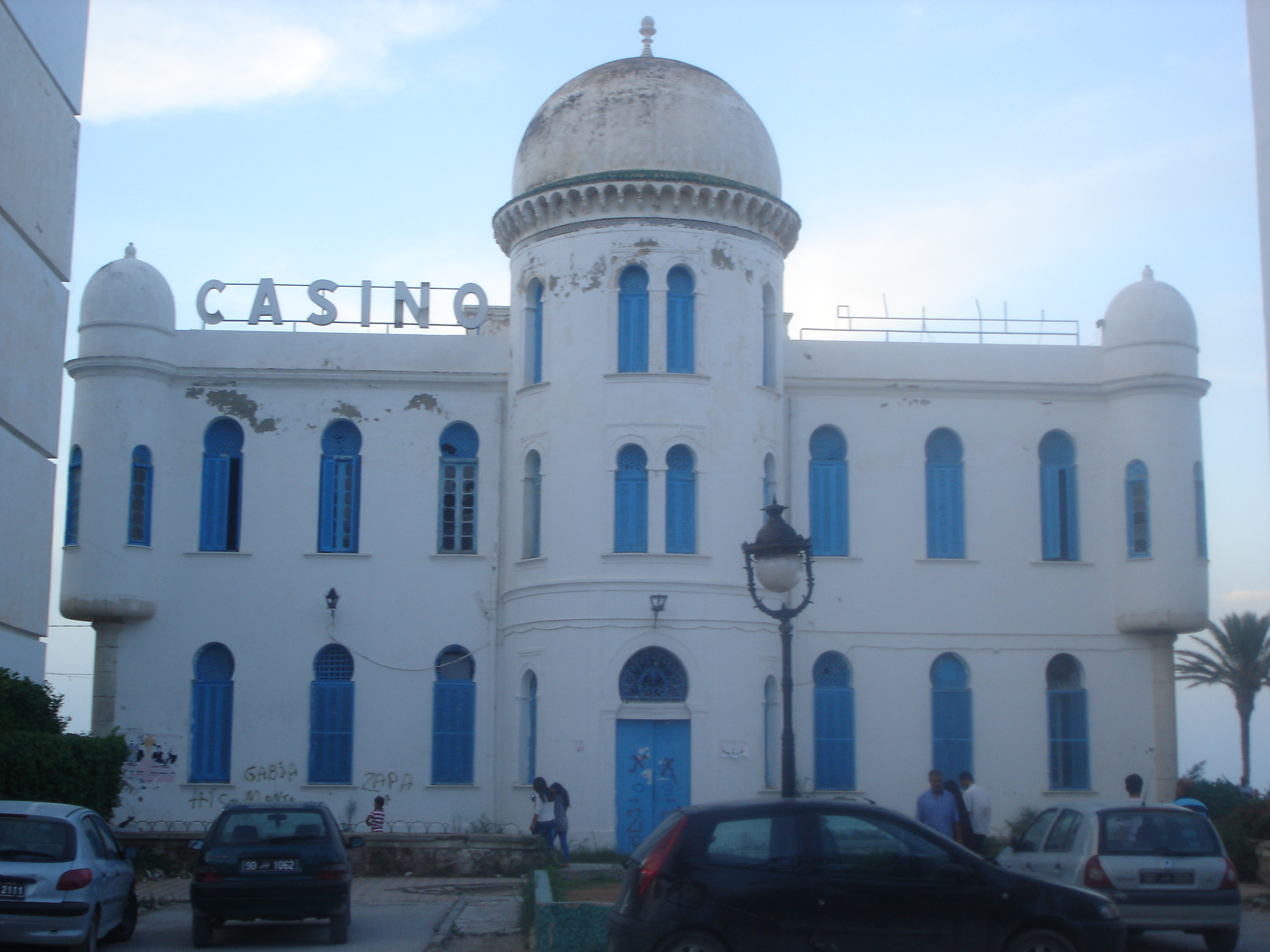 Hôtel Casino, Hammam Lif